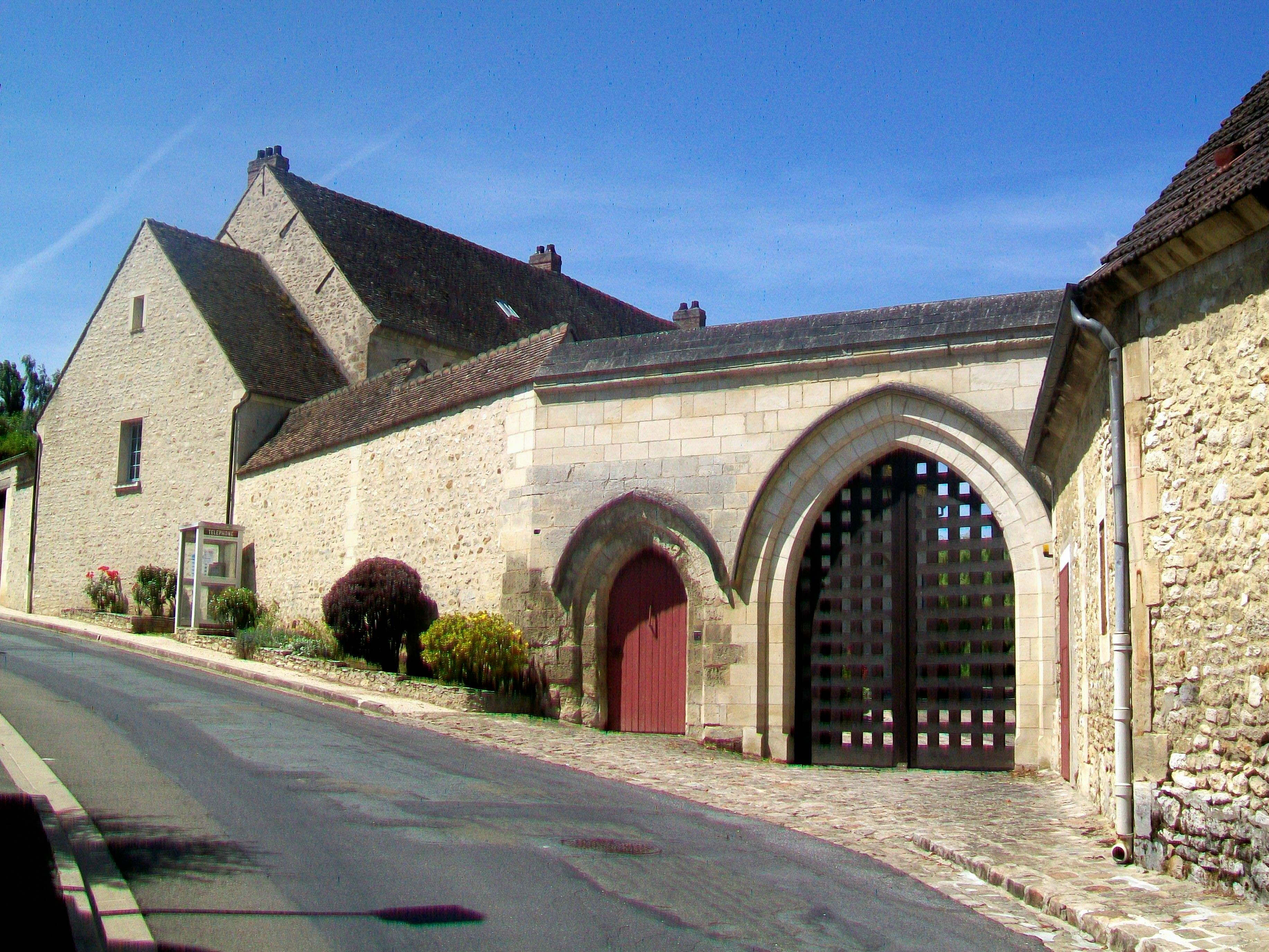 Ancien prieuré reconverti en ferme, 1 Grande-rue.